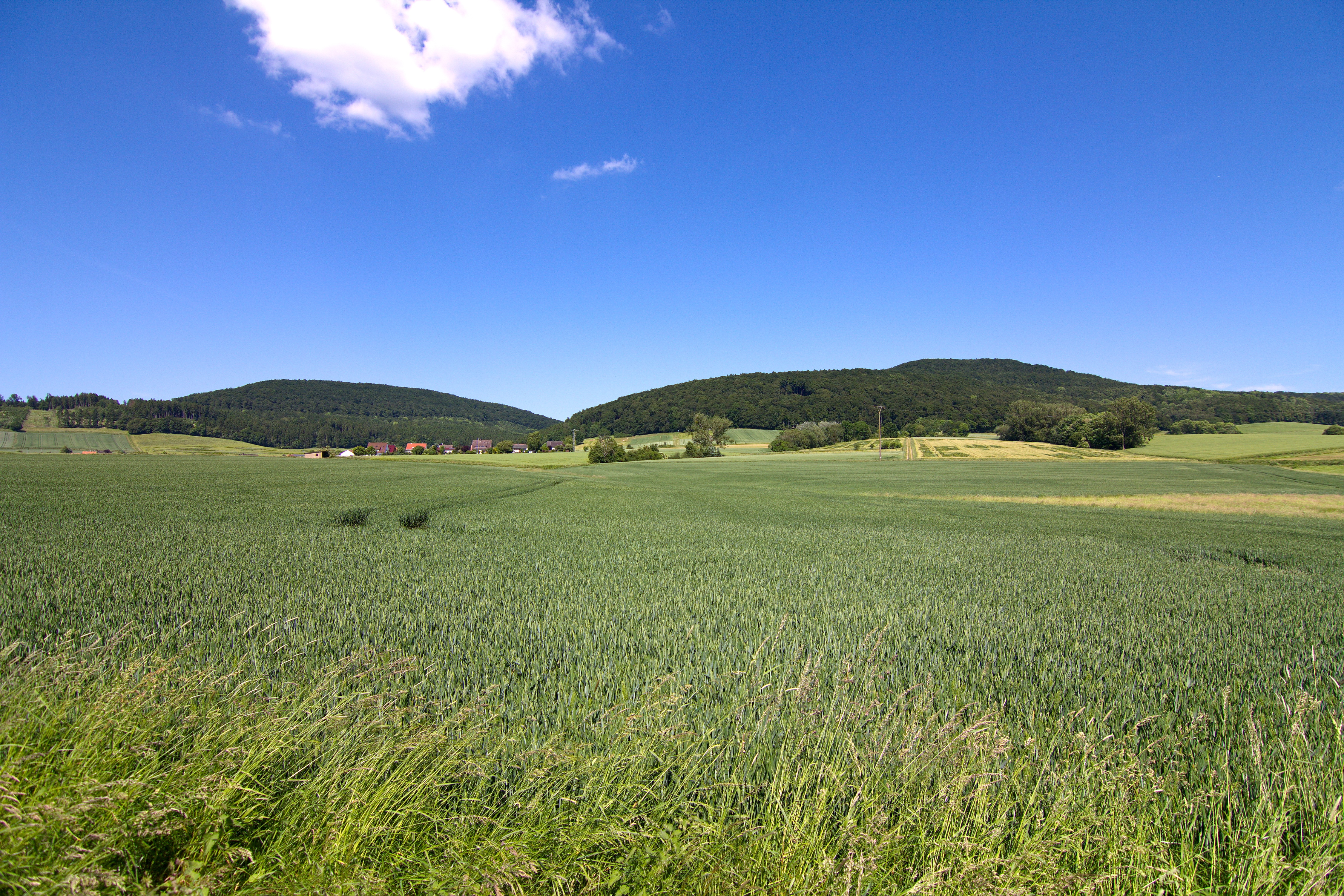 Landschaftsschutzgebiet Süntel, Niedersachsen, Deutschland